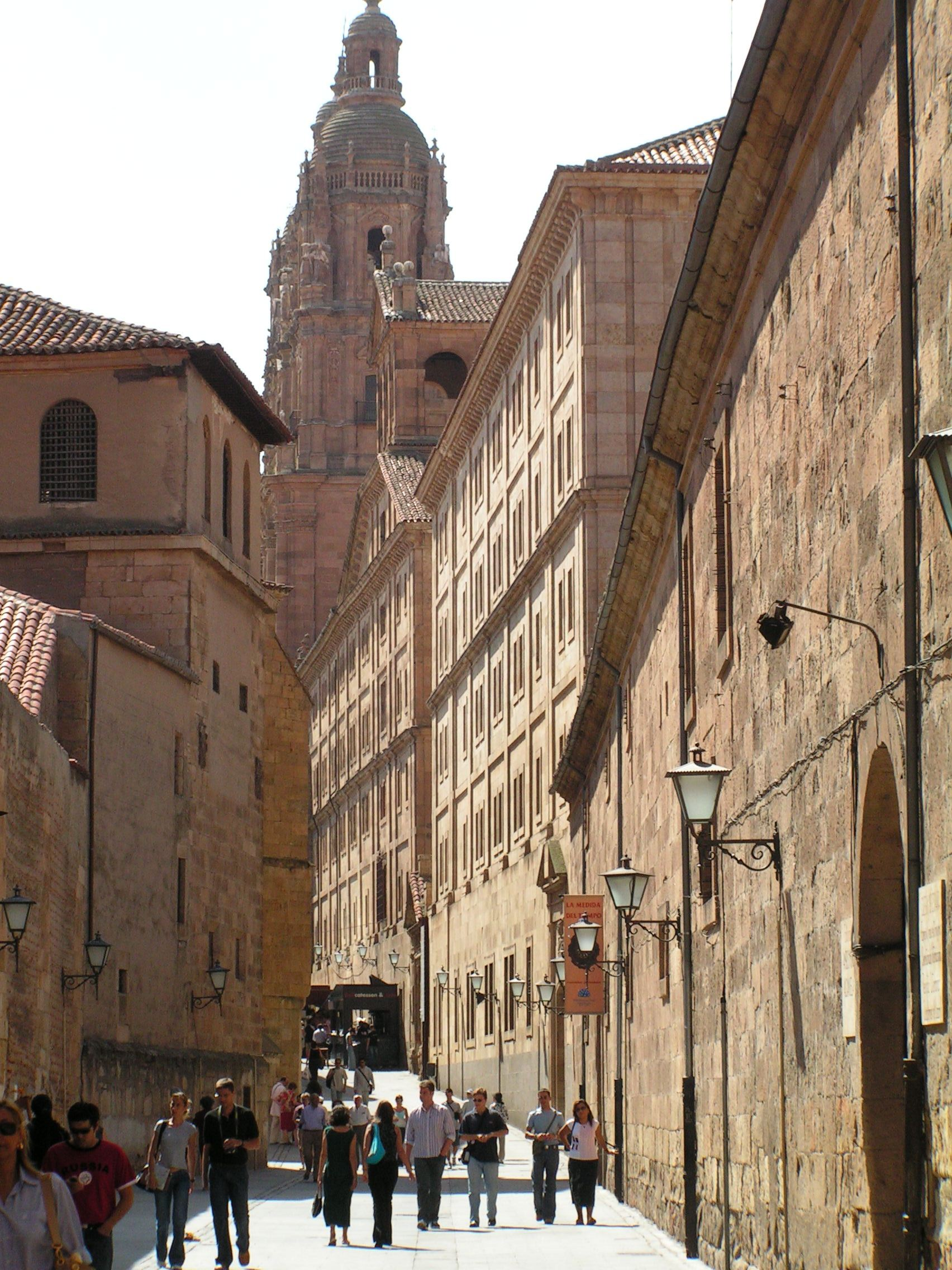 Calle de la Compañía, Salamanca, España.